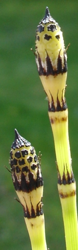 Strobilus de prêle, Jardin des Plantes de Paris